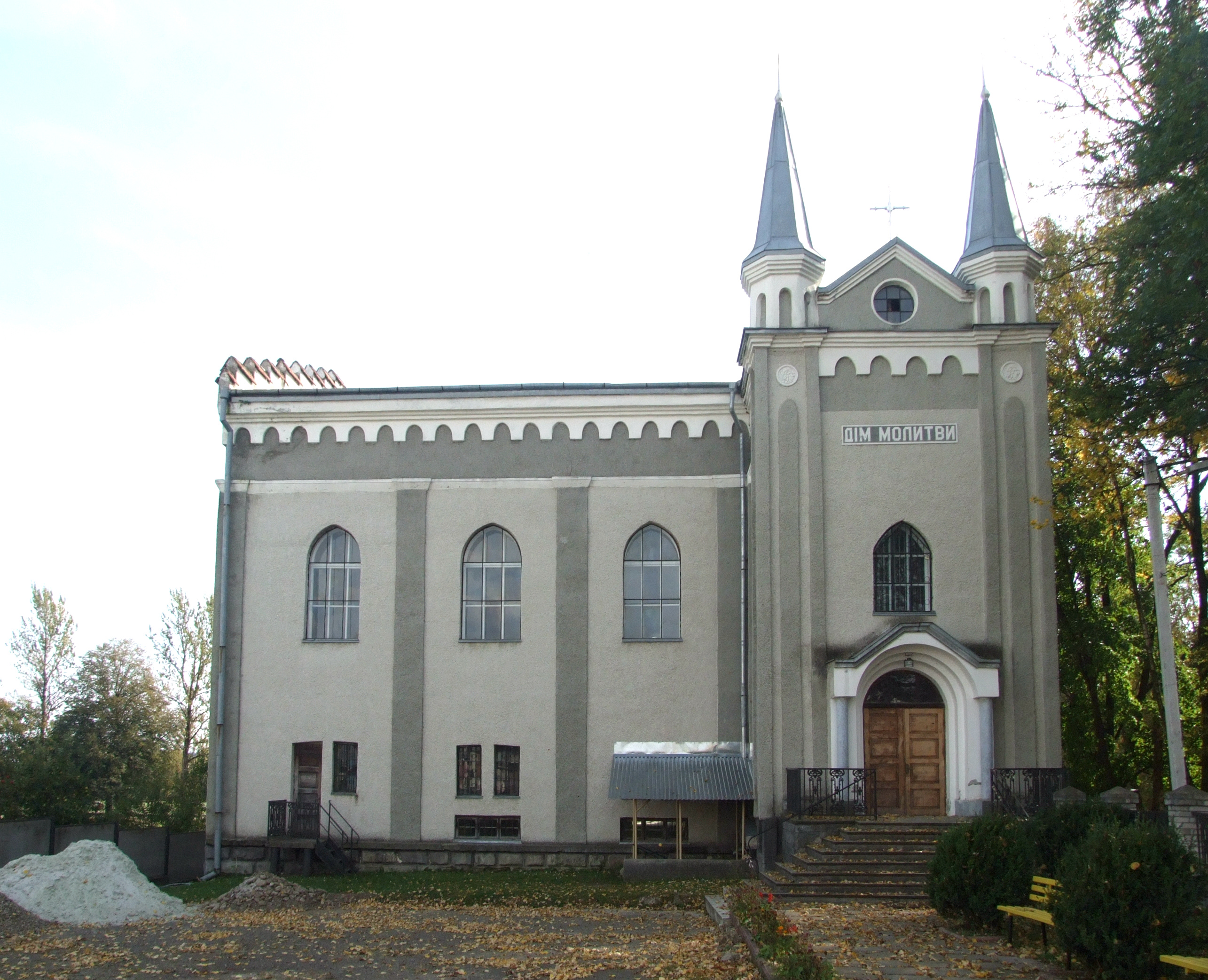 Синагога, поч. 20 ст.